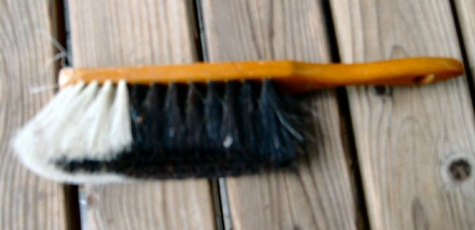 Handfeger